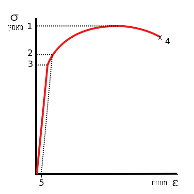 דיאגרמת מאמץ - מעוות של אלומיניום